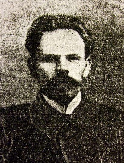 Деятель российского рабочего движения Герасим Сергеевич Усанов (ок. 1870 - после 1922)